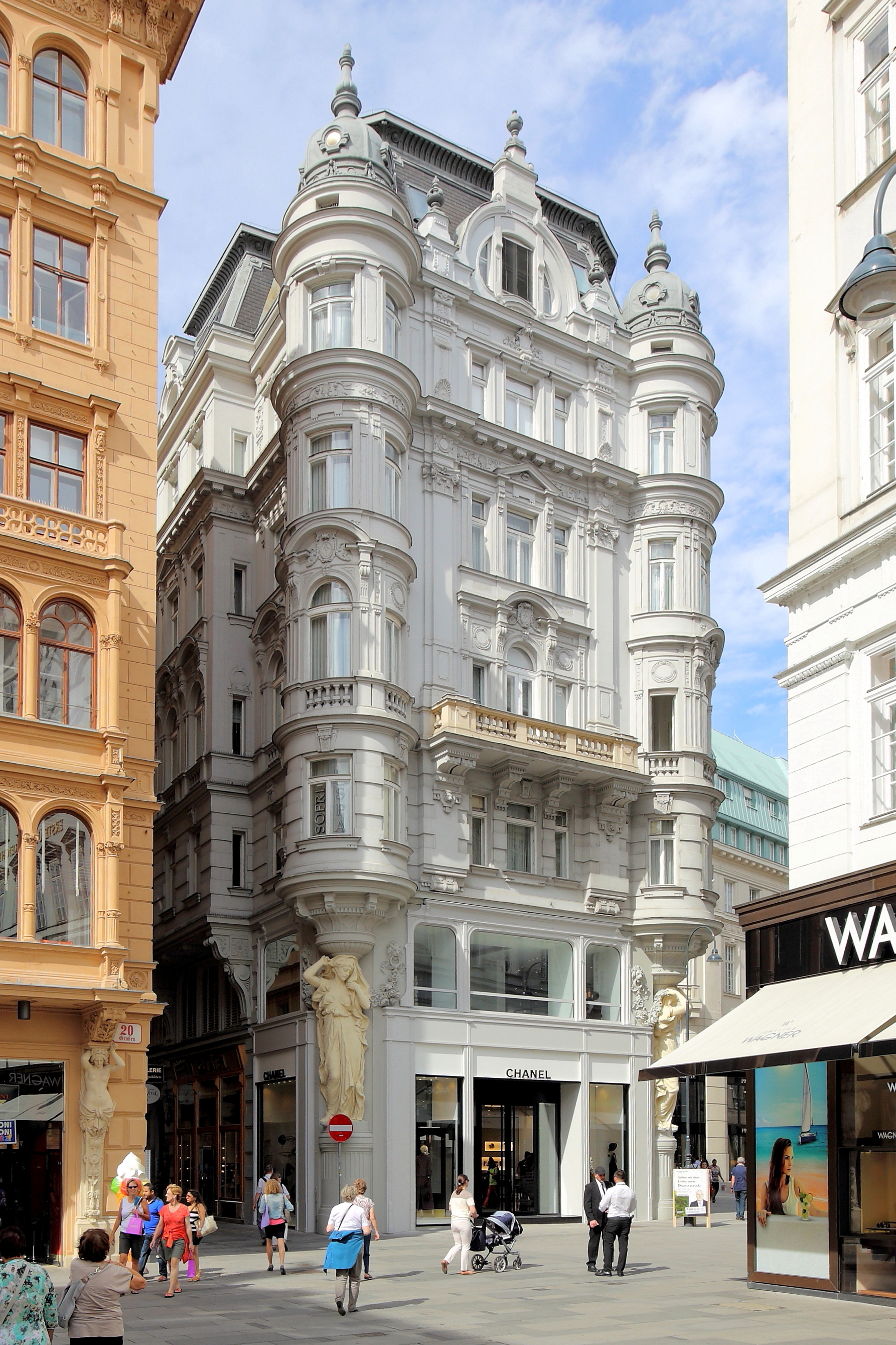 Wohn- und Geschäftshaus an der Adresse Tuchlauben 1 / Bognergasse 1 / Naglergasse 2 im 1. Wiener Gemeindebezirk Innere Stadt.Dieses auf drei Seiten freistehende späthistoristische Haus wurde im Jahr 1901 nach Plänen von Christian Ulrich errichtet. An den Gebäudeecken sind zwei überkuppelte Runderker auf monumentalen Karyatiden, zur Naglergasse hin befindet sich ein viergeschoßiger, dreiachsiger Erker auf Konsolen. Ansonsten ist die Fassade mit Lisenen, Riesenpilaster und dreiteilige Ädikulafenster mit Balkon gegliedert.